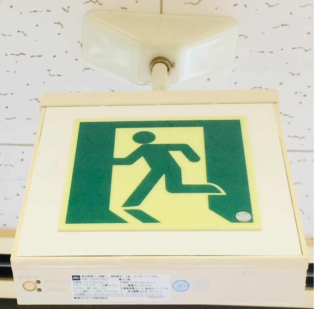 避難口誘導灯・改造品